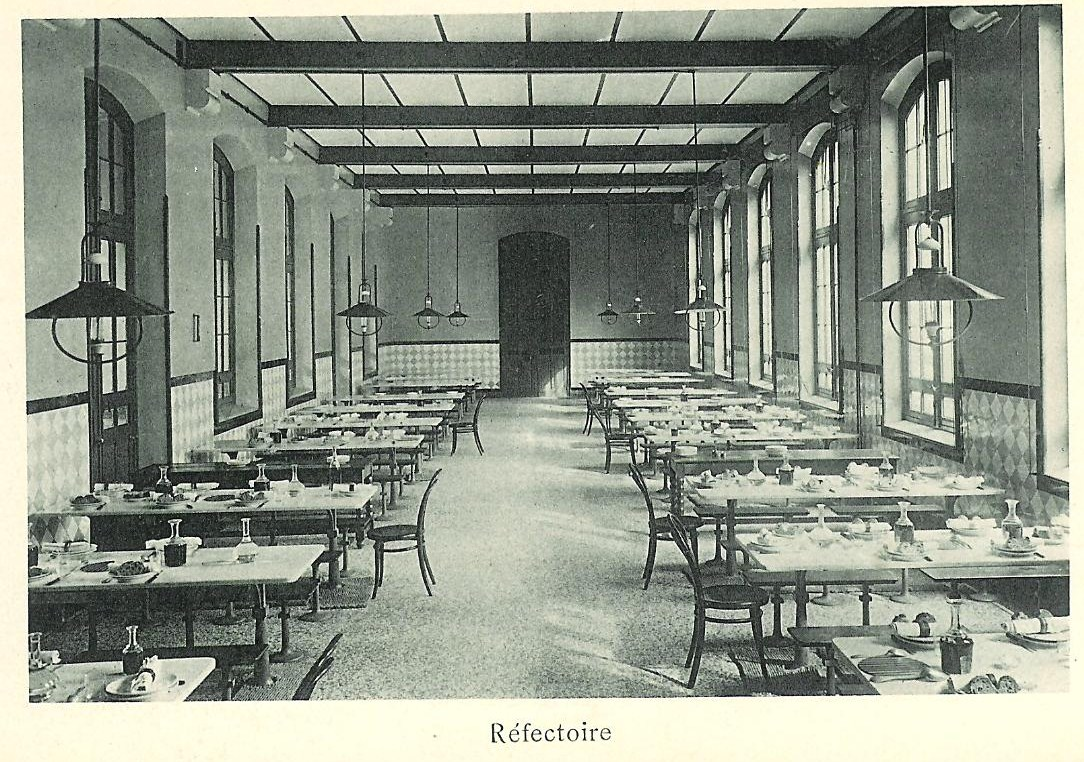 Réfectoire du lycée Molière (Paris)